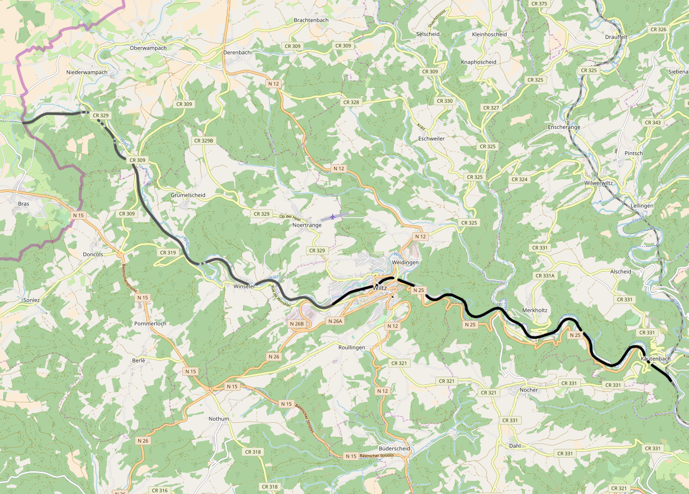 CFL line 1b, Kautenbach - Schimpach-Wampach